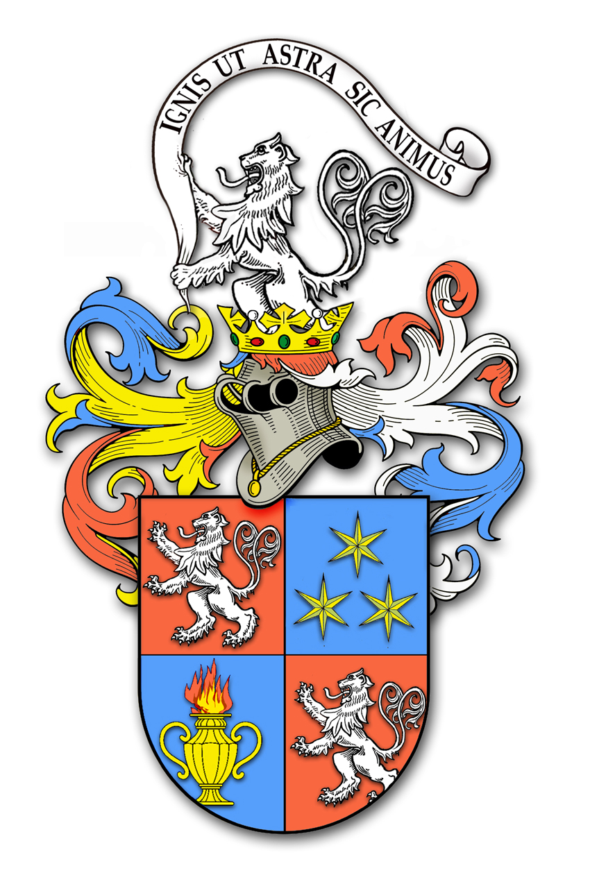 Brasão Avancini de Levico e Brez